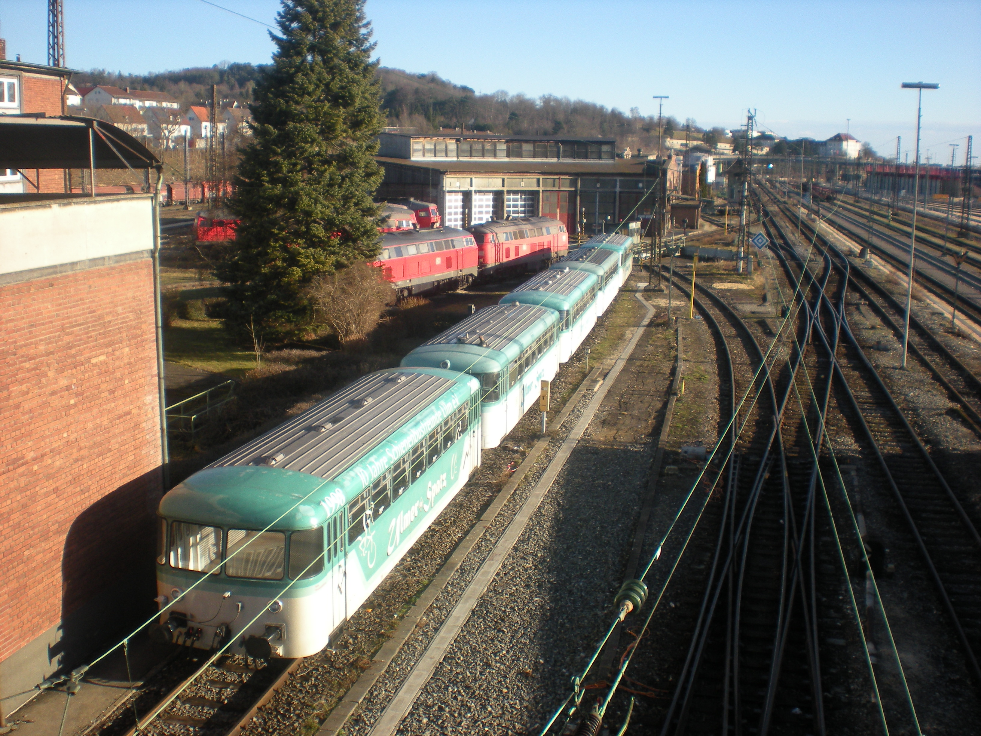 Uerdinger Schienenbus Ulmer Spatz im Bw Ulm Rbf, im Hintergrund Ringlokschuppen und Diesellokomotiven verschiedener Baureihen